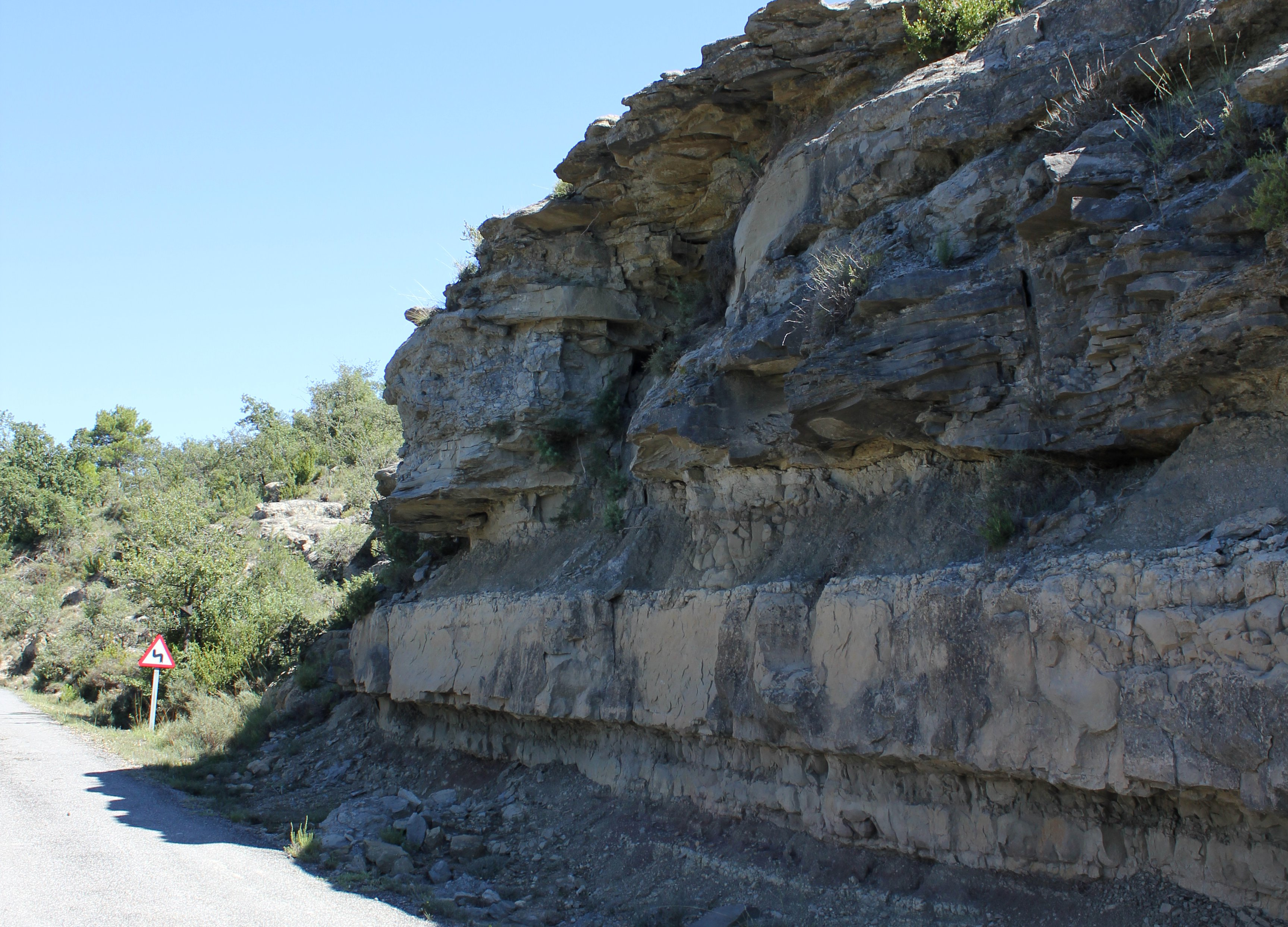 Aragonés: Formacions erosivas en a penya arenisca, en a valle d'o Susía, a'l peu de a carretera HU-V-3611 (a de Castillón).